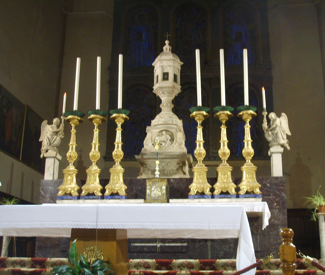 Siena, san domenico, altare maggiore, due angeli di Benedetto da Maiano